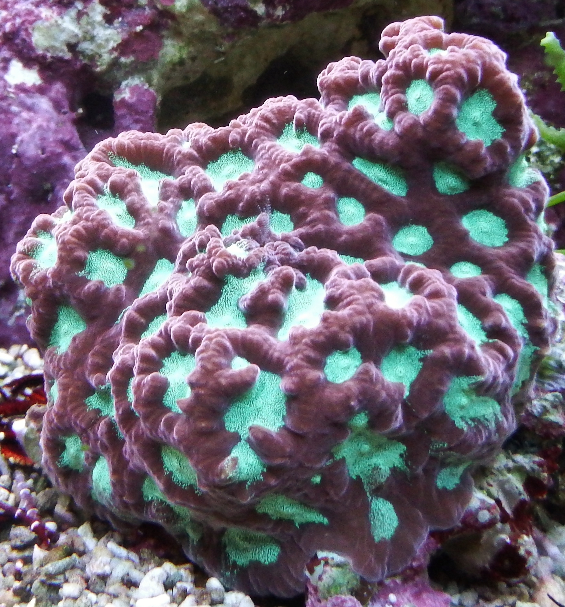 Favites pentagona en acuario de arrecife